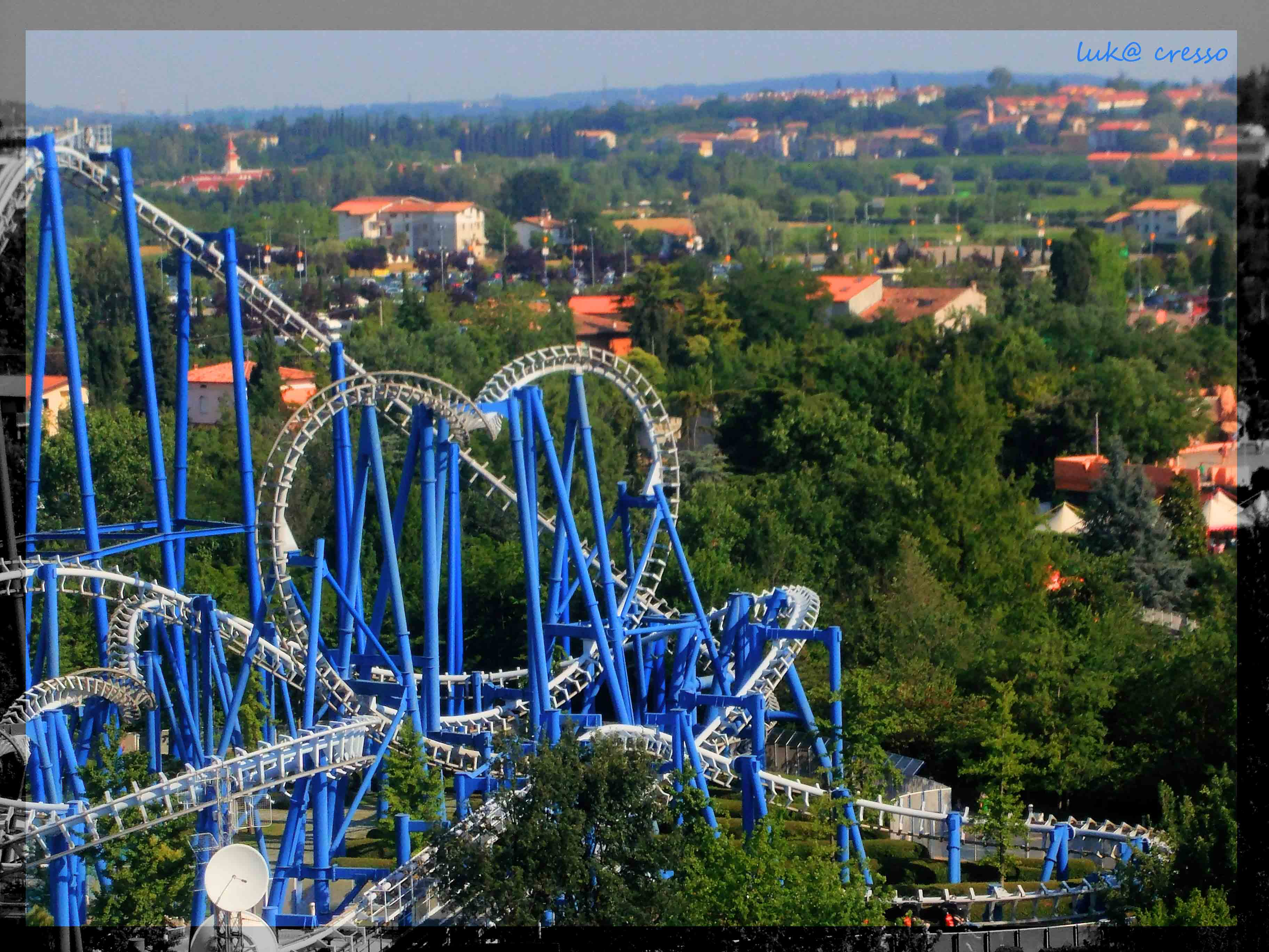 gardalan-il cuore del blue tornado